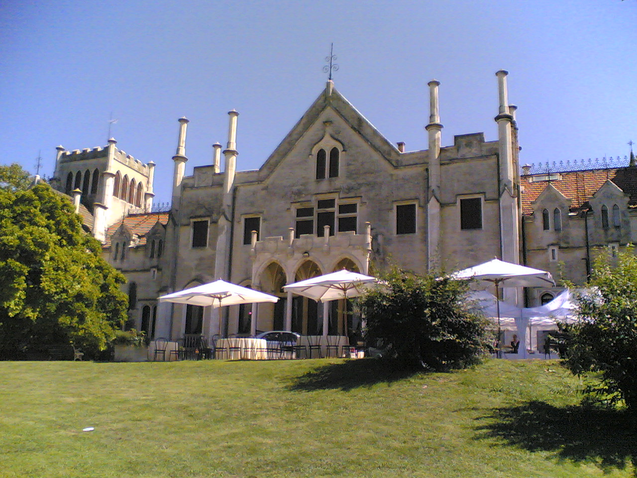 San Polo di Piave, villa Papadopoli, fronte verso il parco.